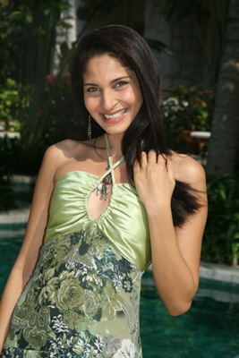 Miss Earth Tanzania 2006 and Miss Tanzania 2007 Richa Adhia in Miss World 2007, Sanya, China